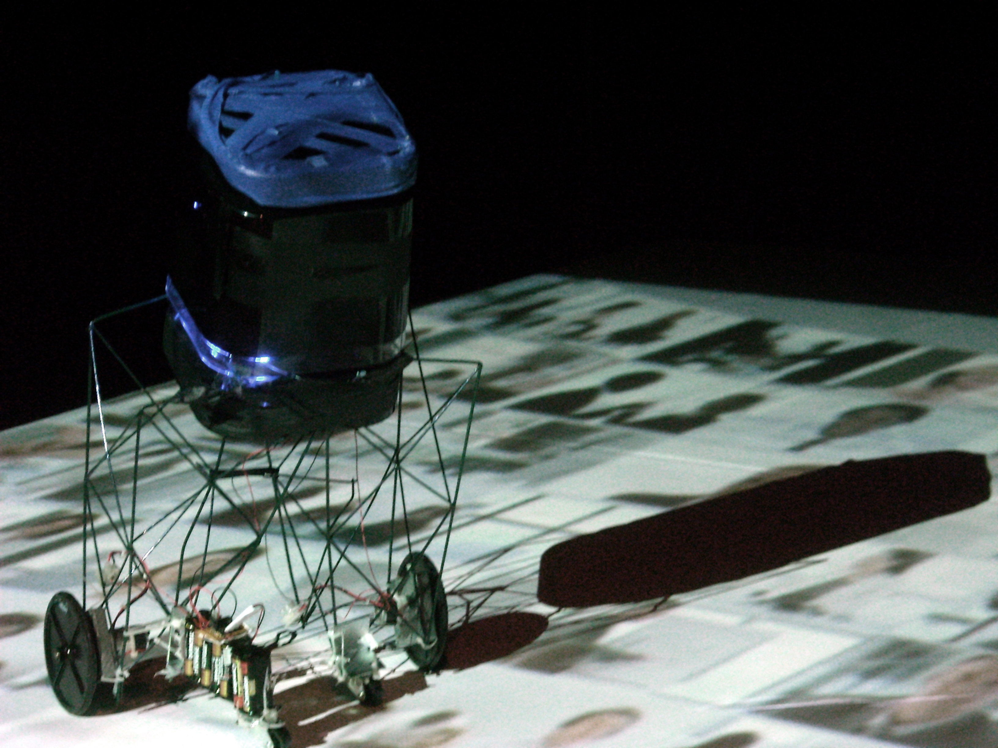 Hermes Oper von Karl Heinz Jeron